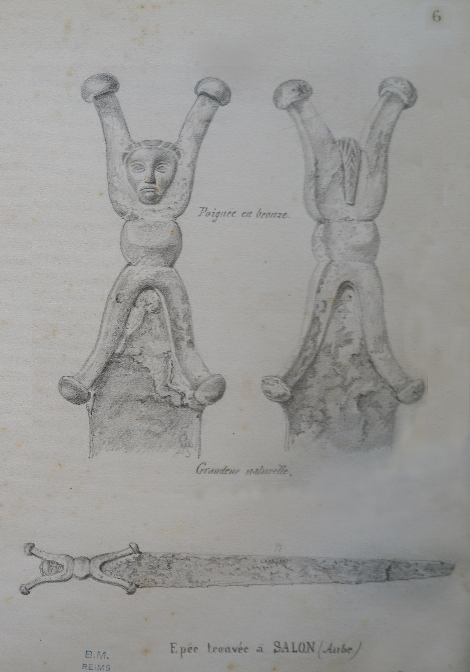 retour sur le fouilles de Morel par des dessins de Gastebois.